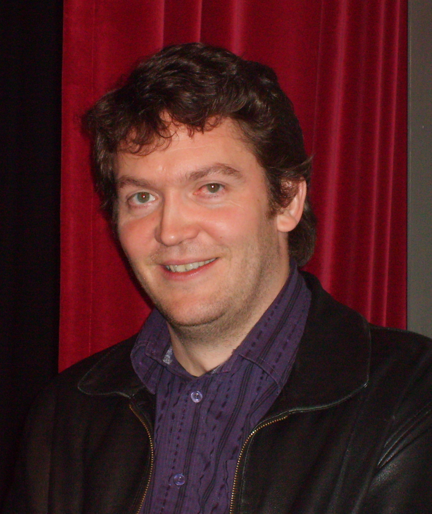 Trygve Brøske etter ein konsert i Sør-Tustna forsamlingshus på Tustna på Nordmøre torsdag den 7. mai 2009.